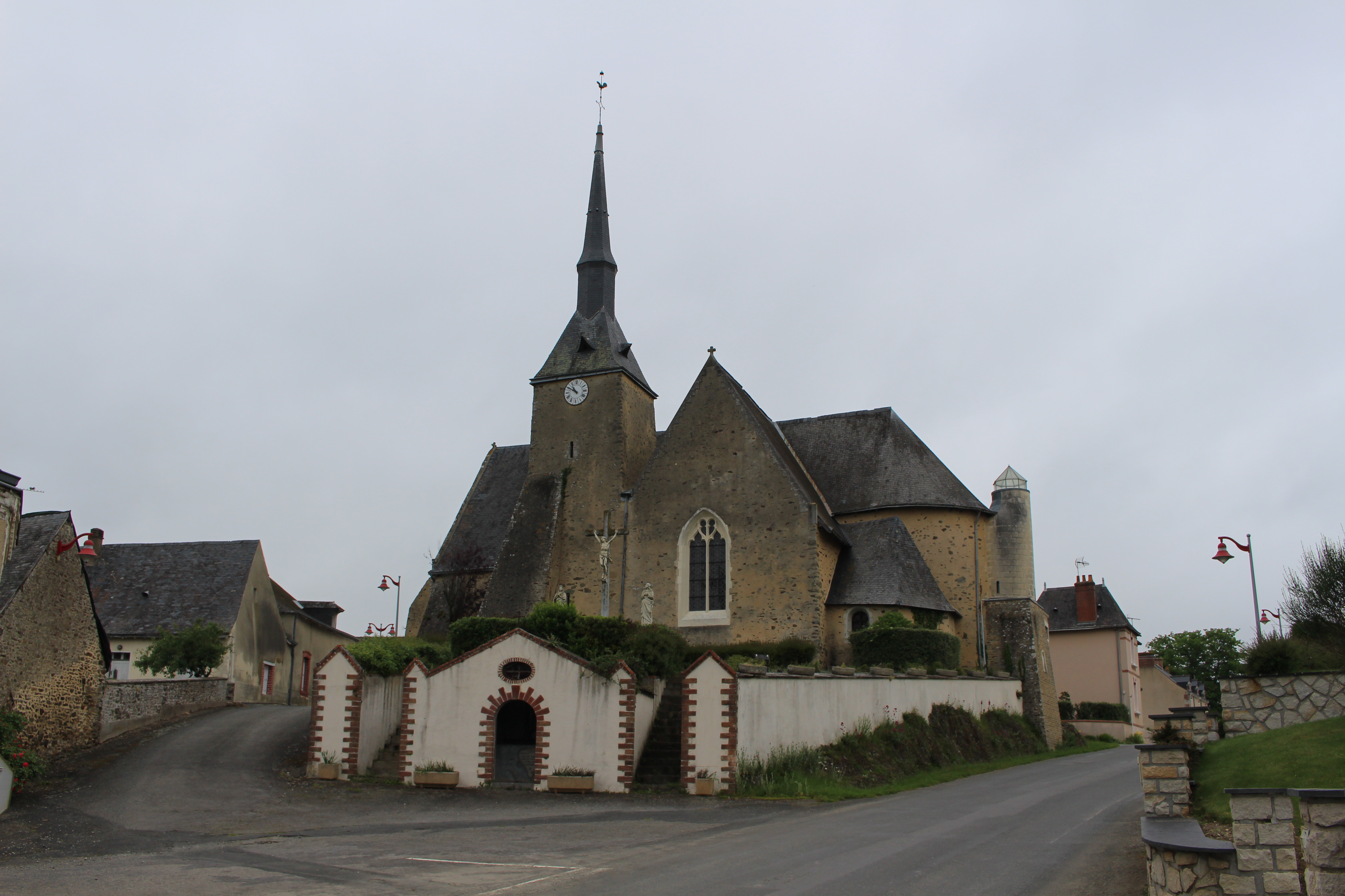 La Chapelle-Craonnaise, Mayenne